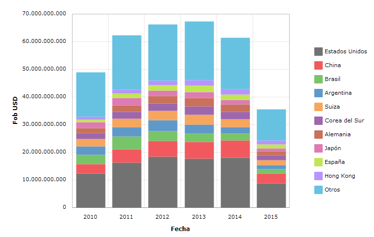 Importaciones de Chile del periodo 2010-hasta septiembre 2015 expresadas en USD valor FOB.